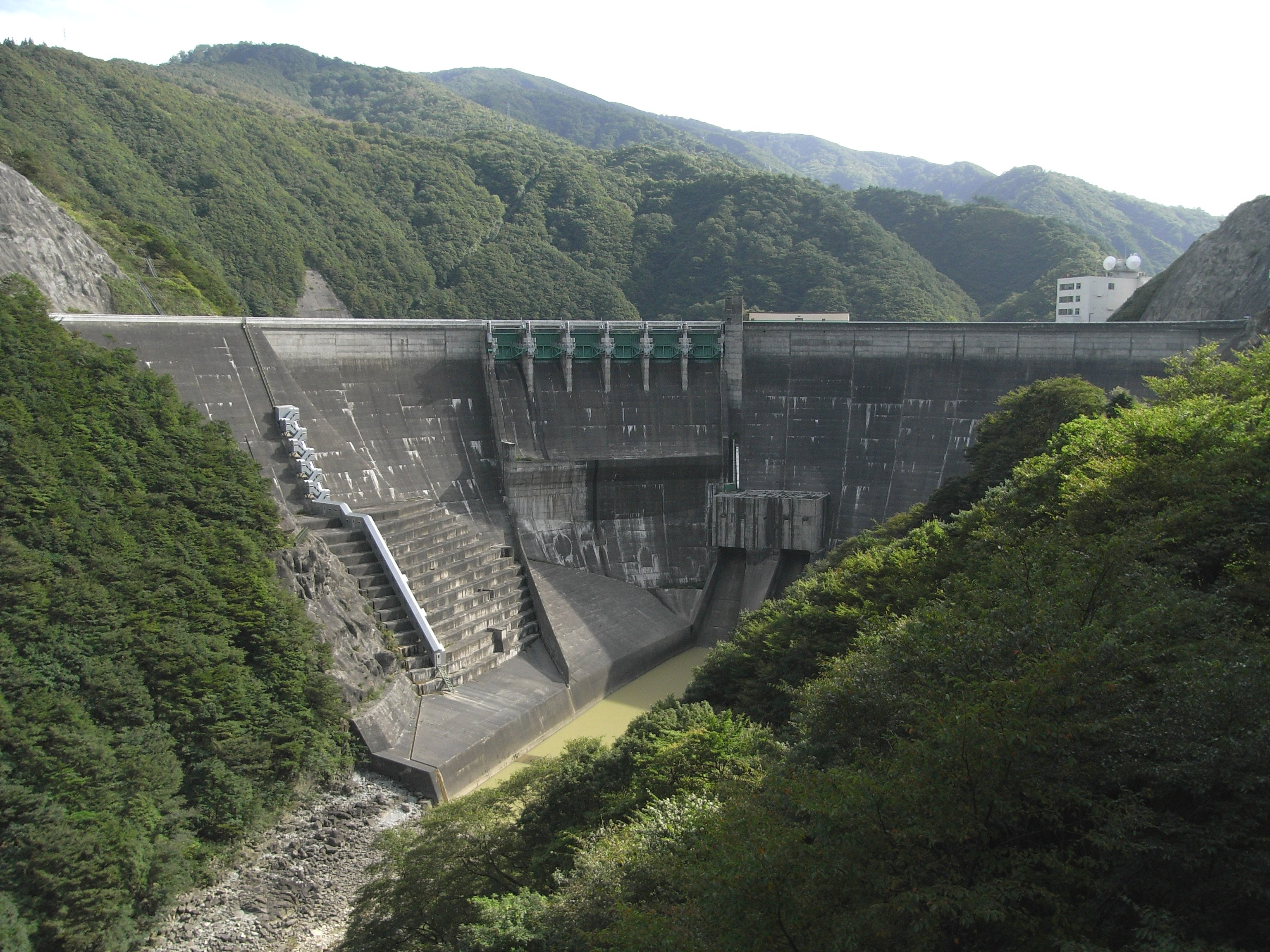 Dam